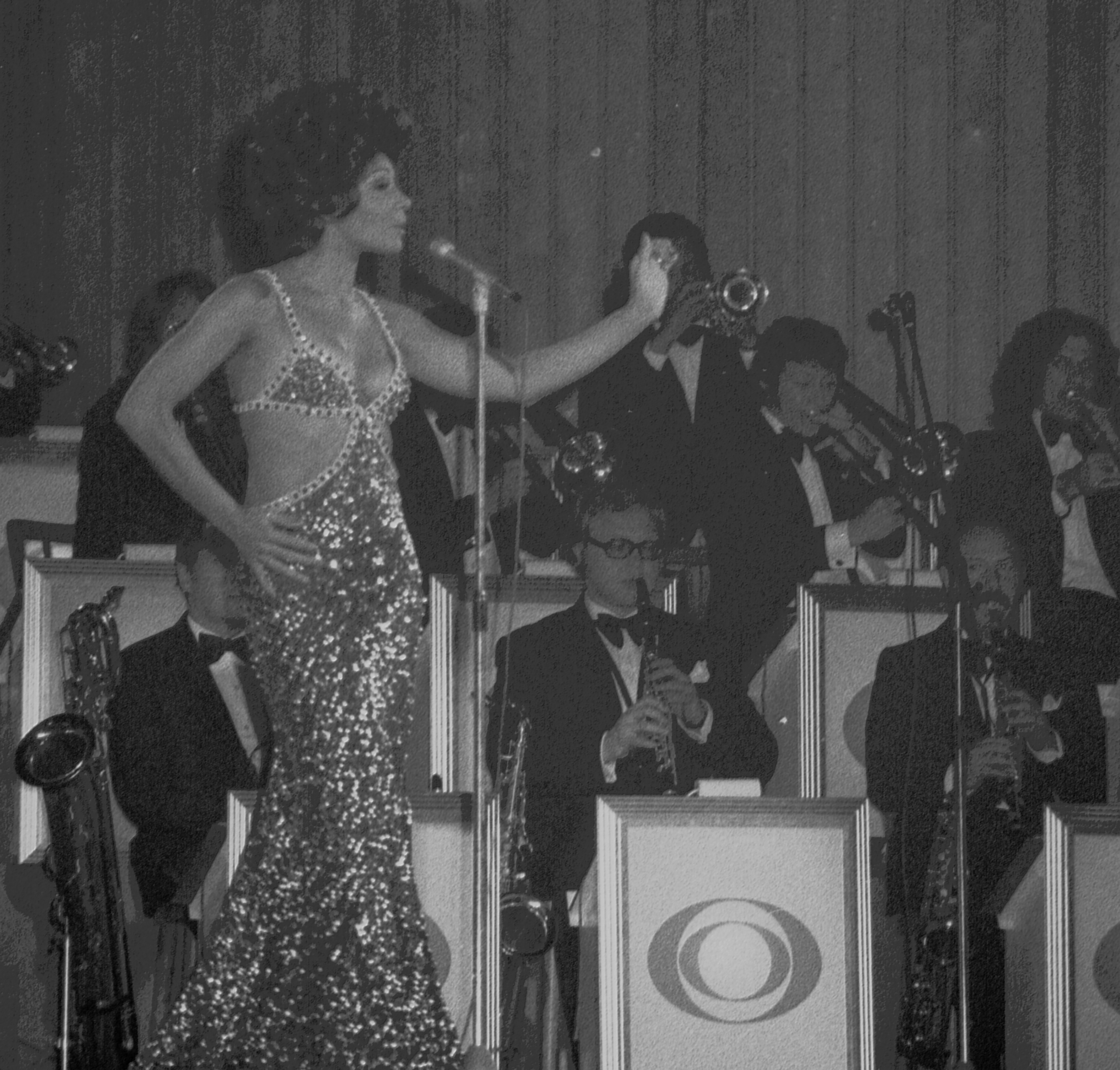 Concert de shirley Bassey début des années 70 à la Muensterhalle de Munster en Allemagne ( Westphalie)